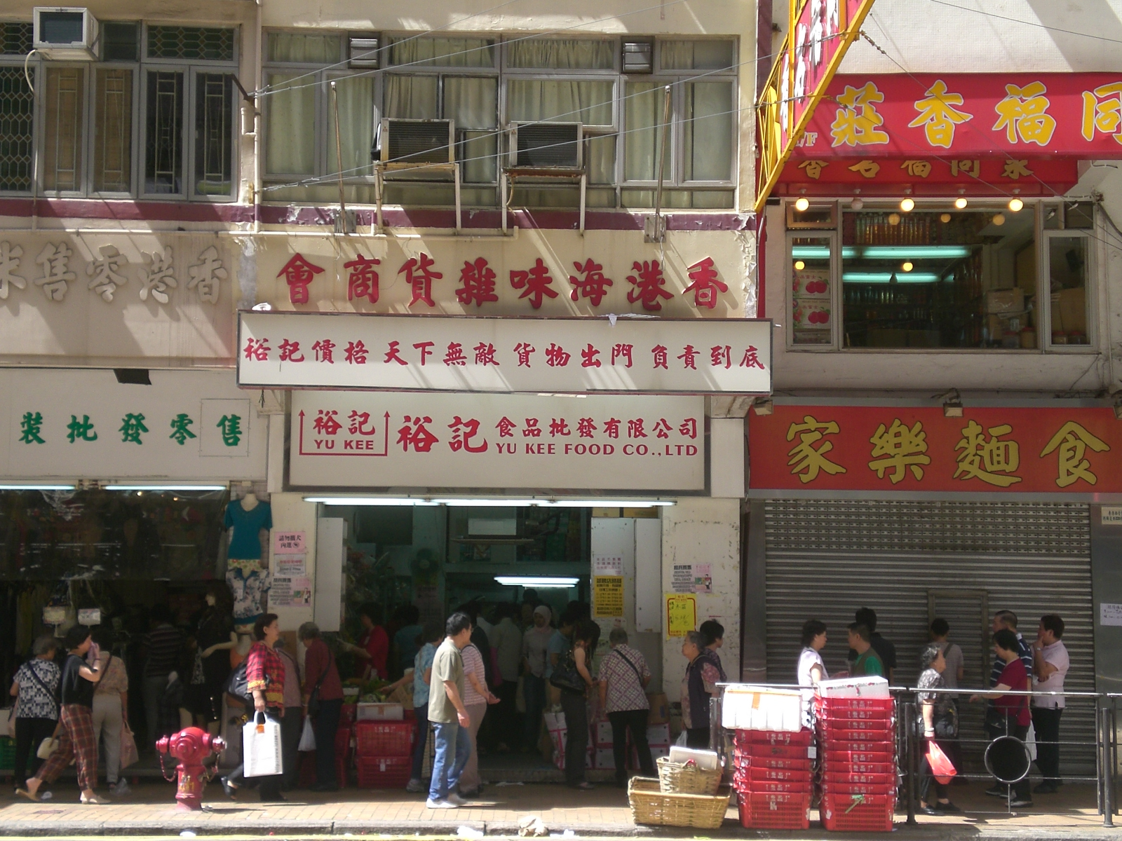 中文（香港）: 西環德輔道西裕記食品